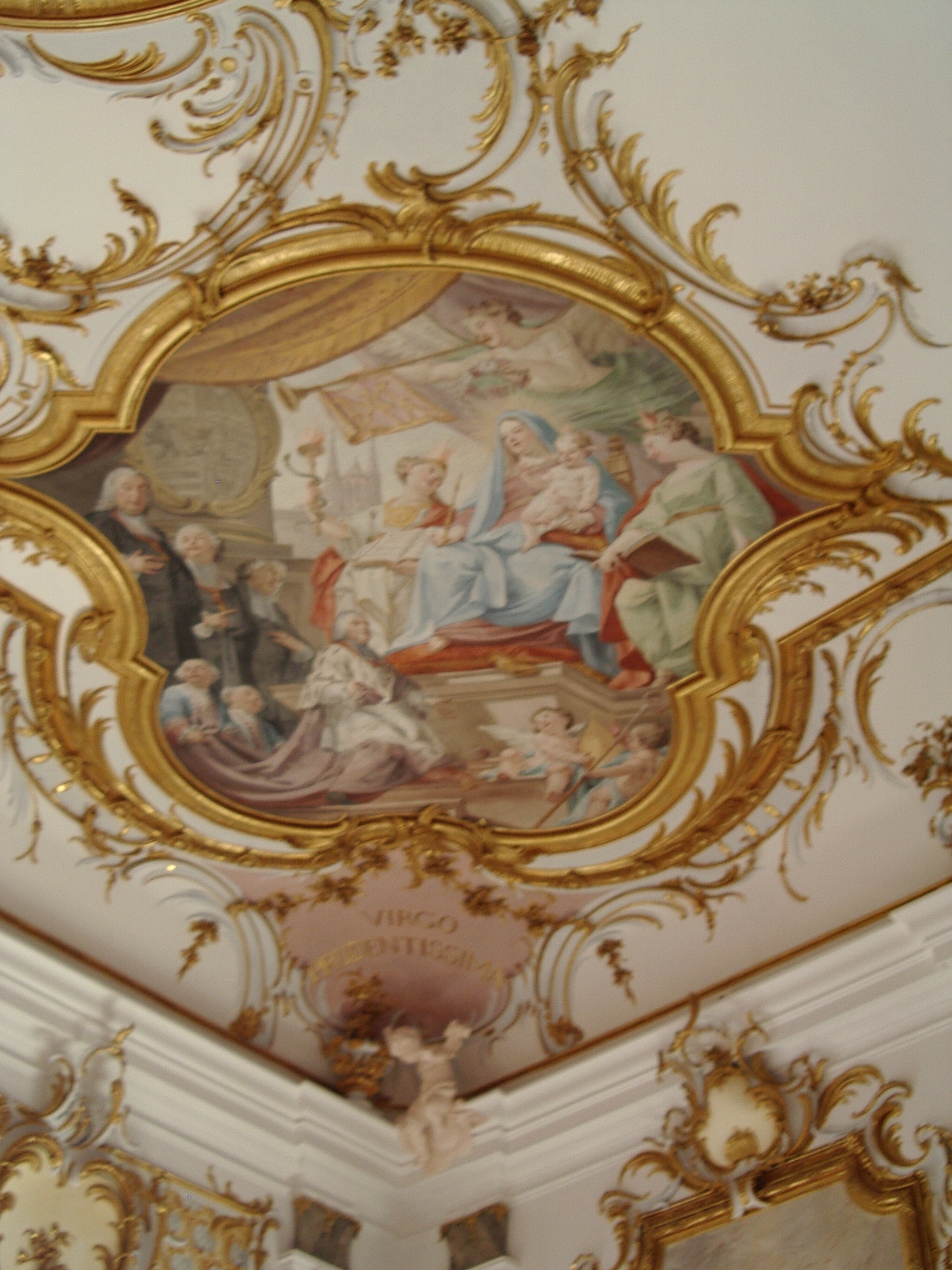 Photographie einer Eckinschrift im Kleinen Goldenen Saal (Augsburg)